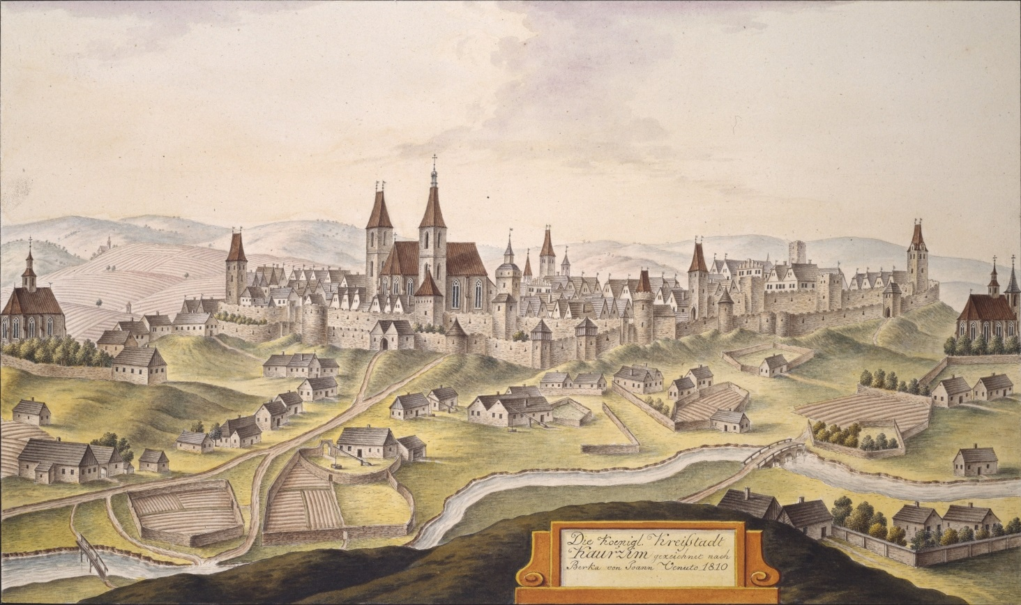 Kouřim. Die Koenigl. Kreisstadt Kauřzim gezeichnet nach Berka von Joann Venuto 1810